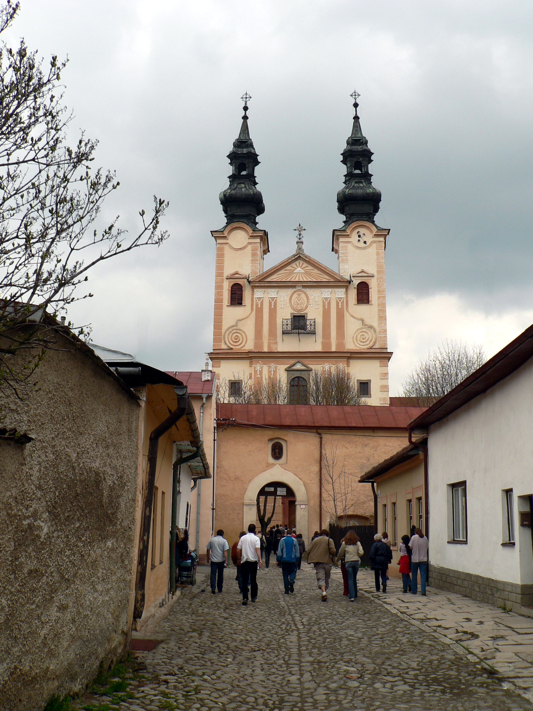 Podolin, piarista templom